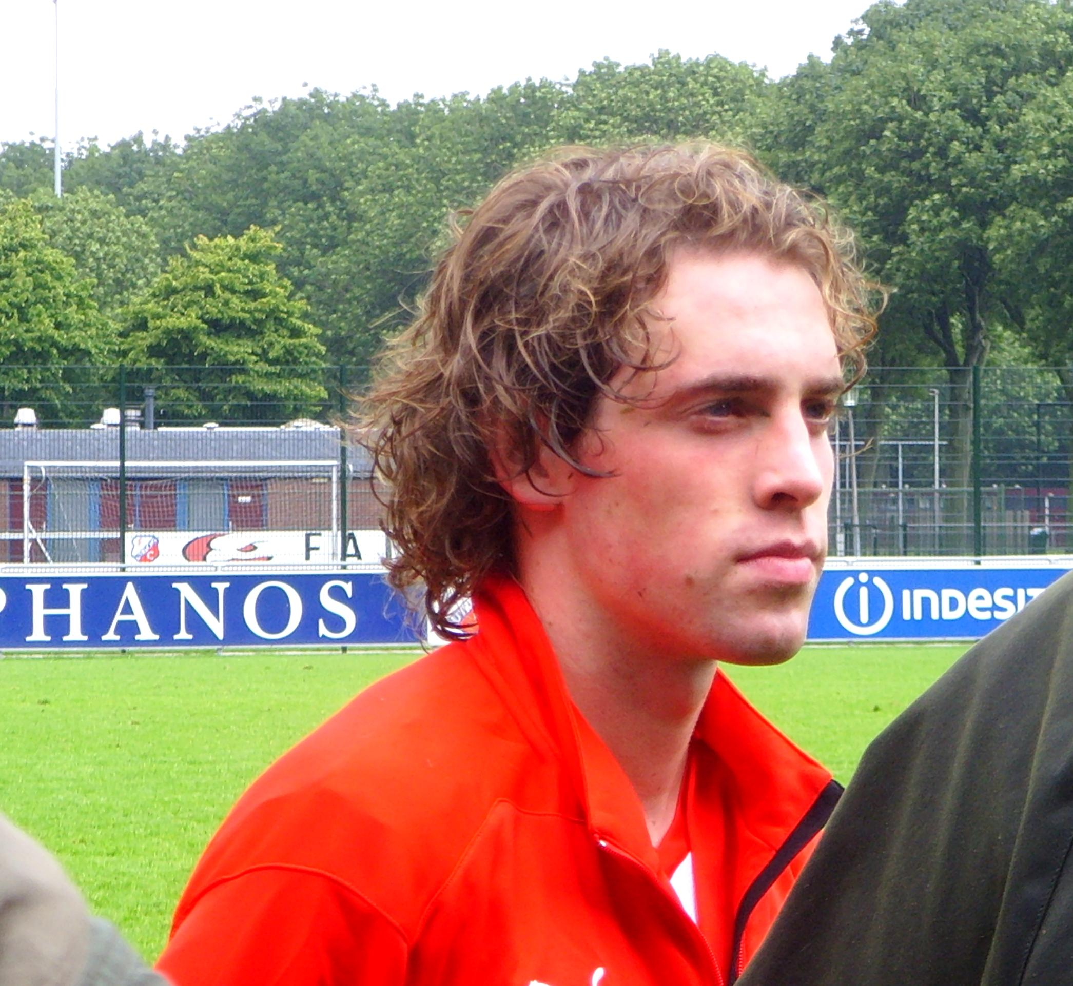 Barry Maguire na de eerste training van het seizoen 2008-2009 van FC Utrecht